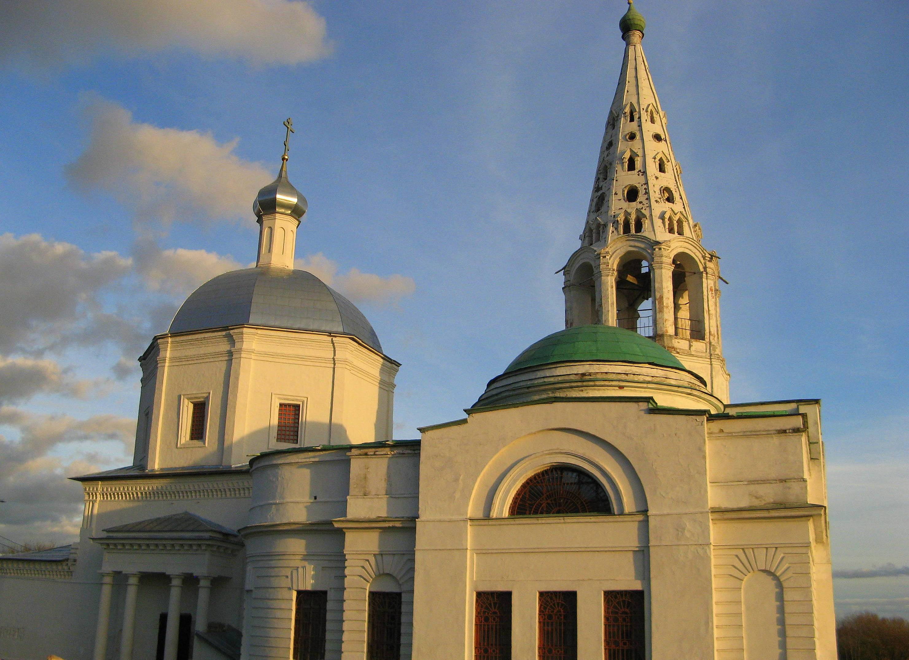 Собор Троицы Живоначальной (в федеральной базе «Собор Троицкий. Остатки ограды») (Москва и Московская область, Серпухов, улица Красная Гора, Тульская)